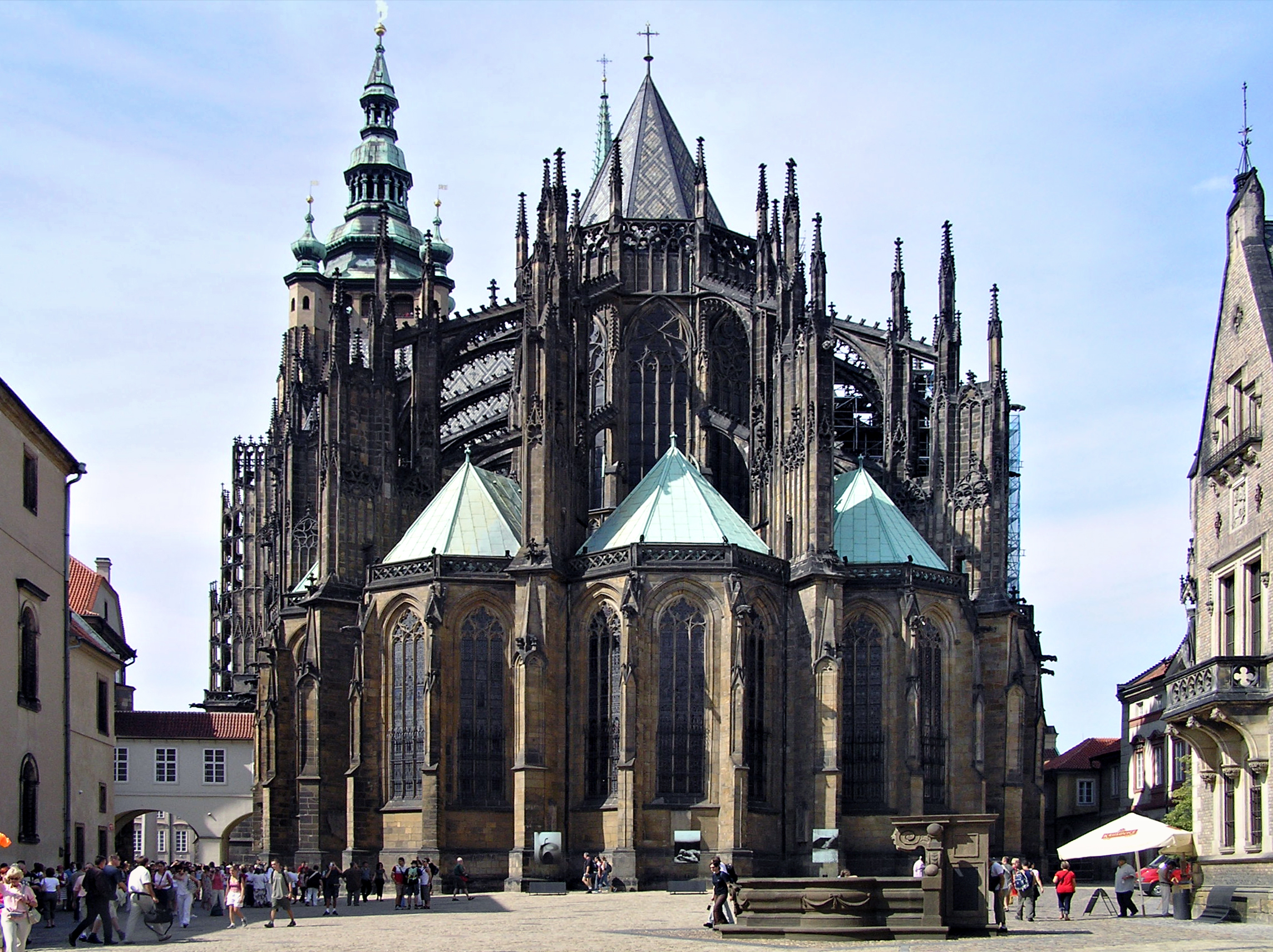 Prague (République tchèque) - Chevet de la cathédrale Saint-Vitus